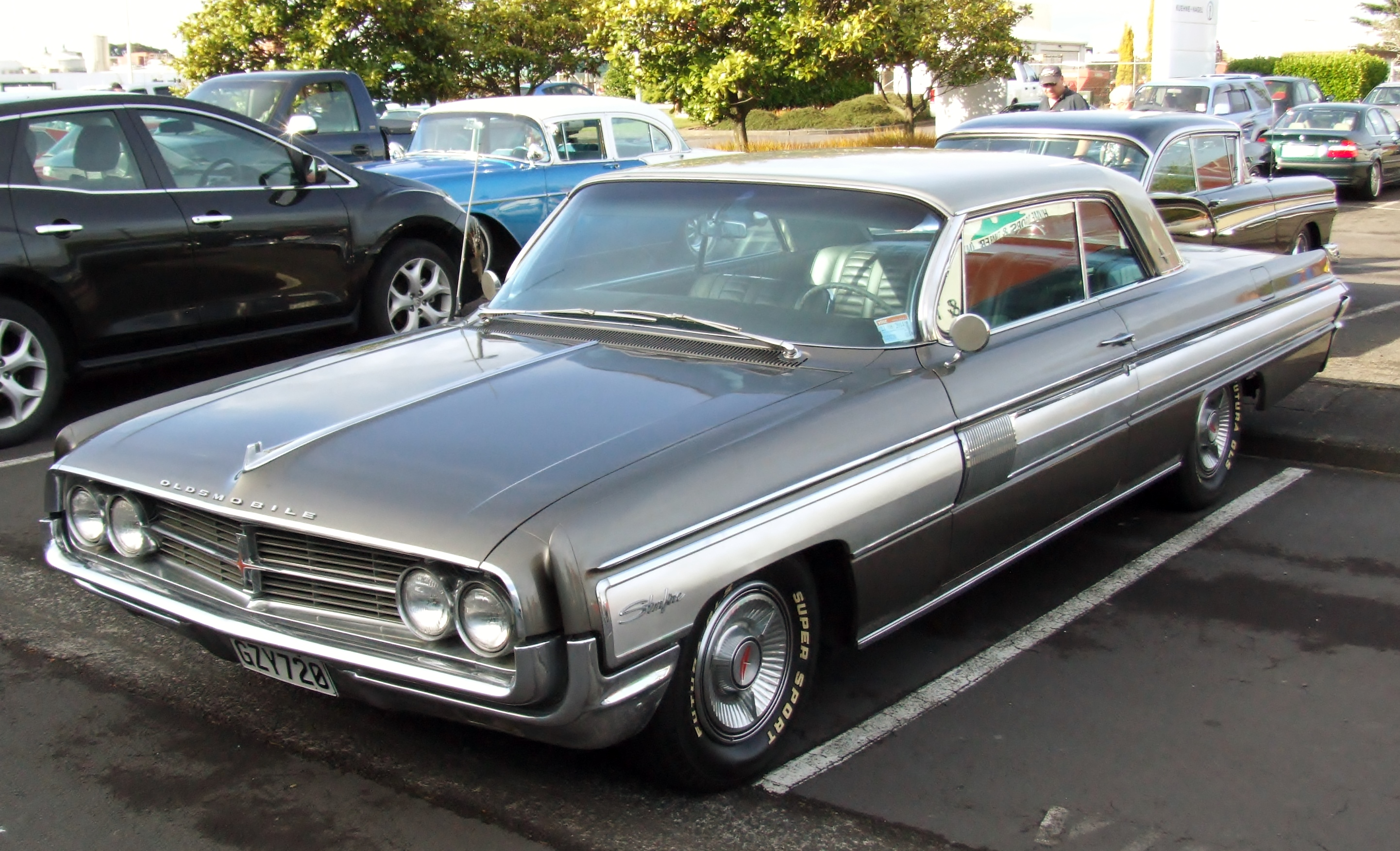 1962 Oldsmobile Starfire